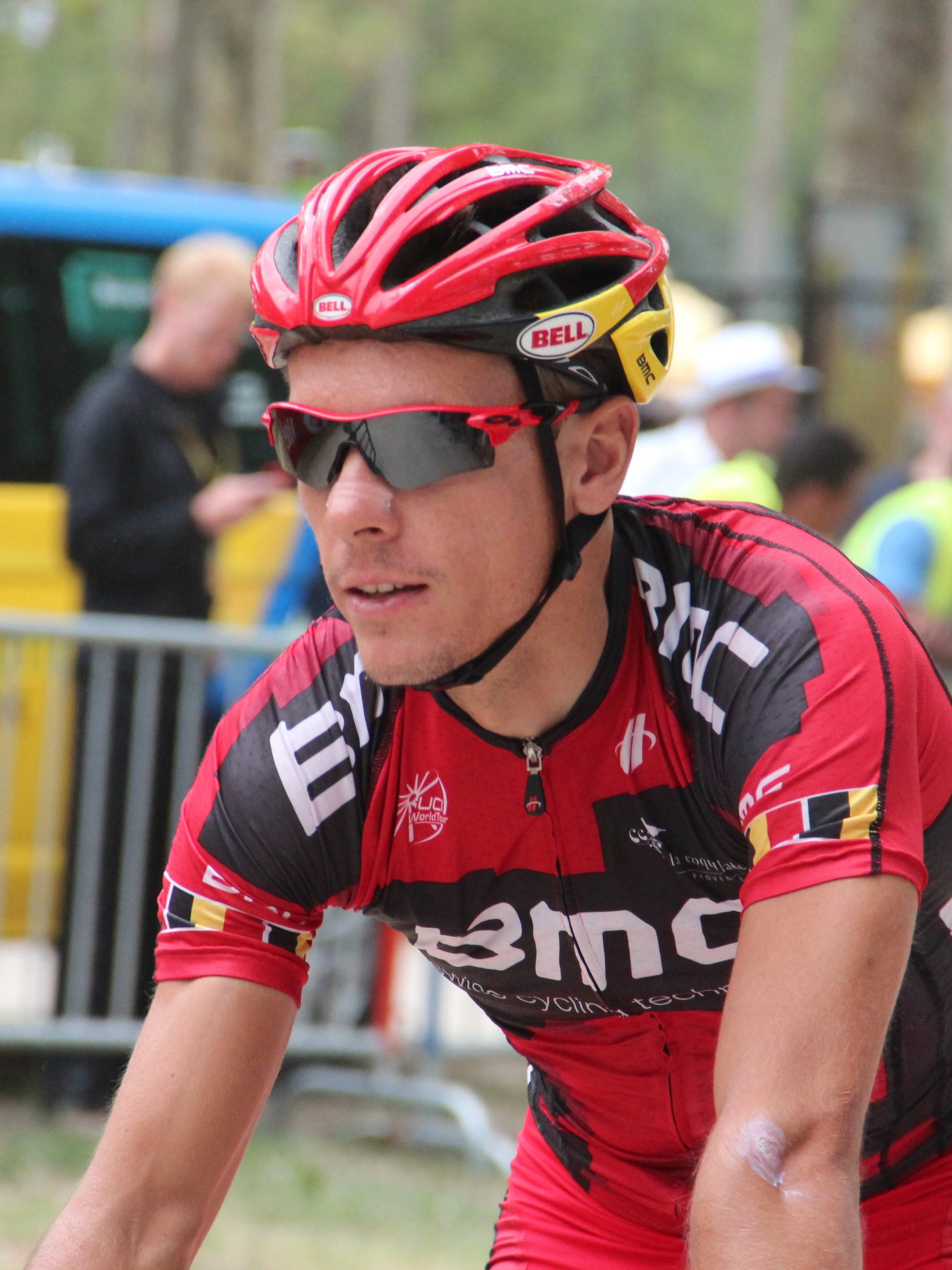 Philippe Gilbert avant le départ de la 18e étape du Tour de France 2012.